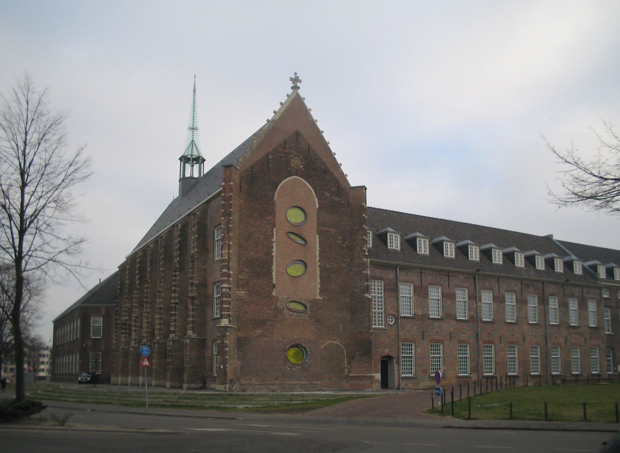 Kloosterkazerne,Breda, dec. 2005